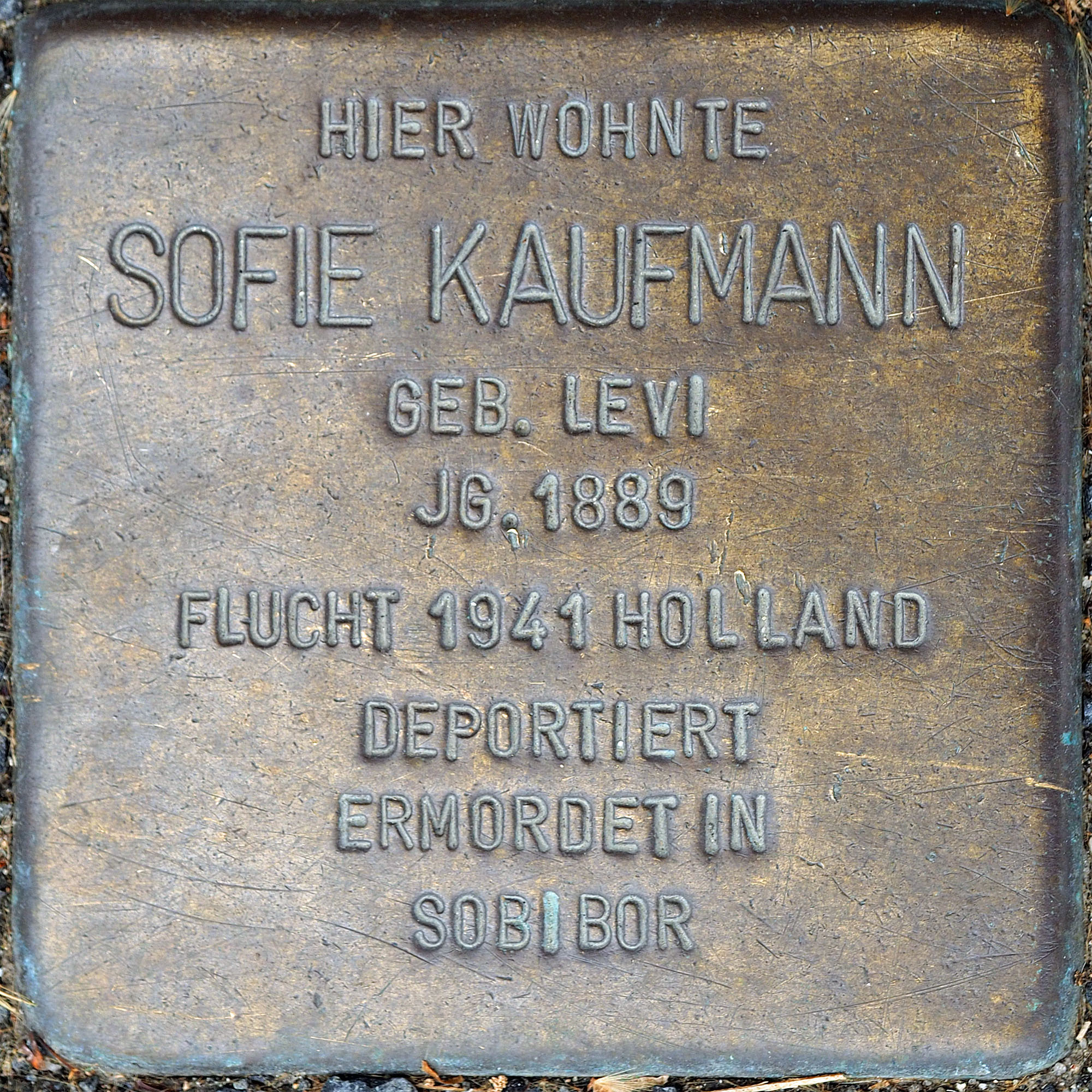 Stolpersteine MG: Kaufmann, Sofie